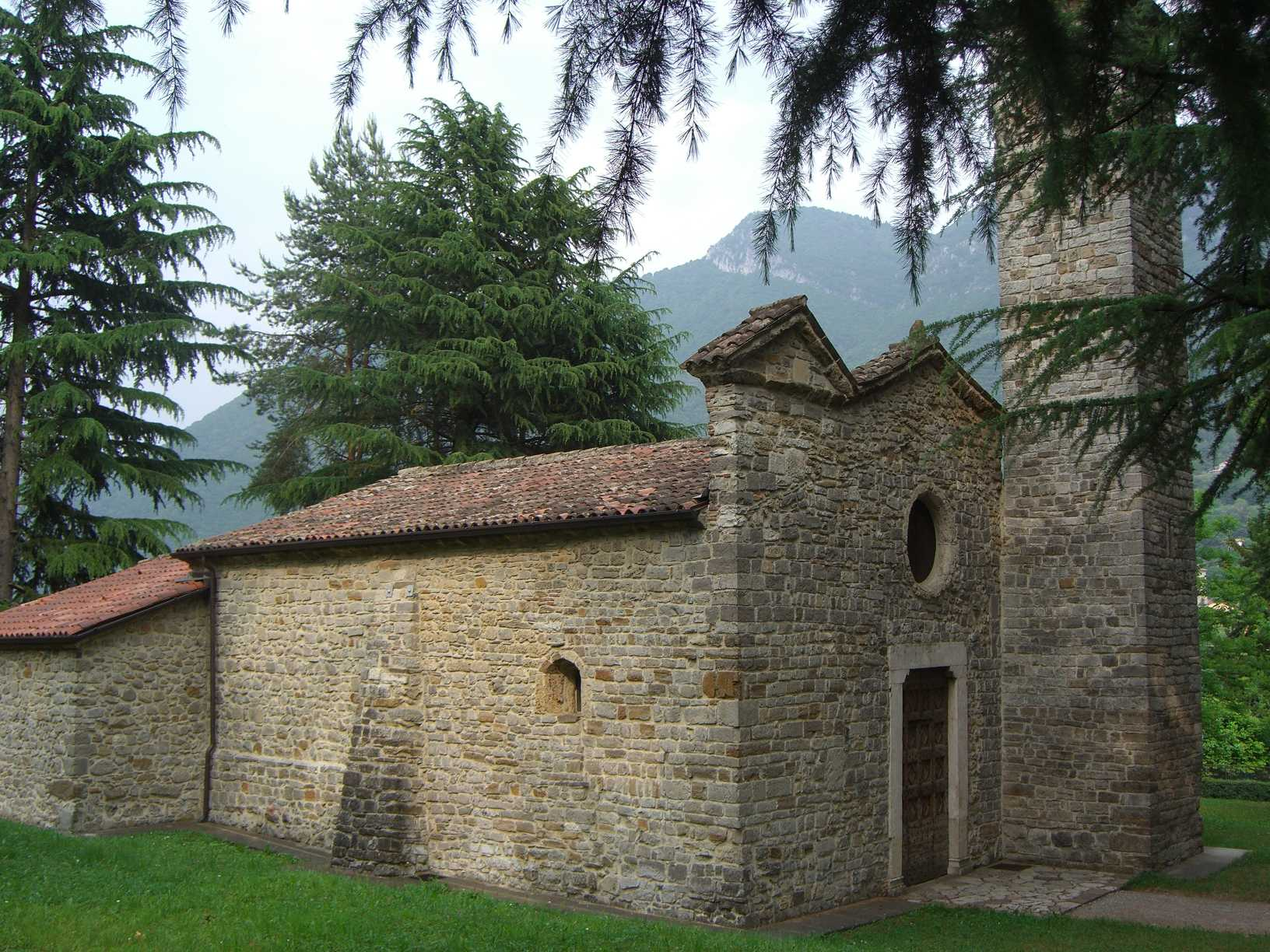 BG Spinone al lago chiesa roamnica di San Pietro in Vincoli